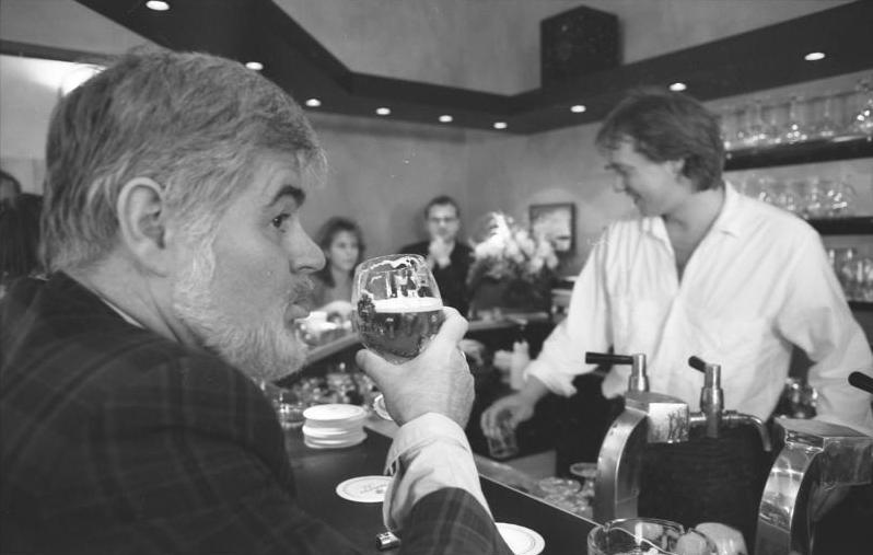 Juni 1988 Bonn: Neueröffnung einer Gaststätte